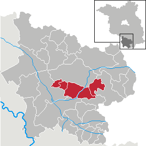 Amt Elsterland in Brandenburg (Country) - District Elbe-Elster